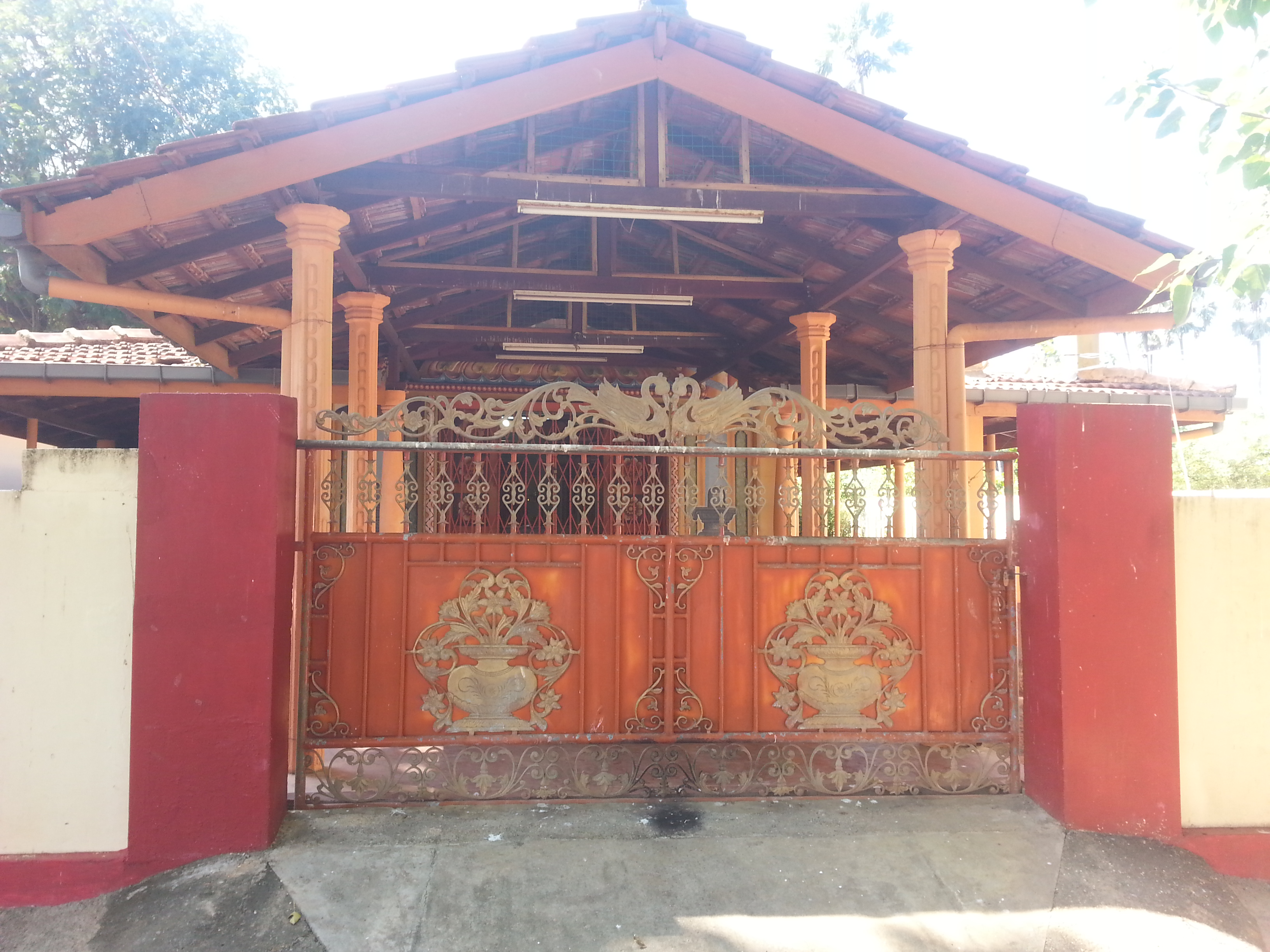 மௌனகுரு அருளம்பல சுவாமிகள் அவர்களின் சமாதியின் வெளிப்றபு வாயிற்கதவு